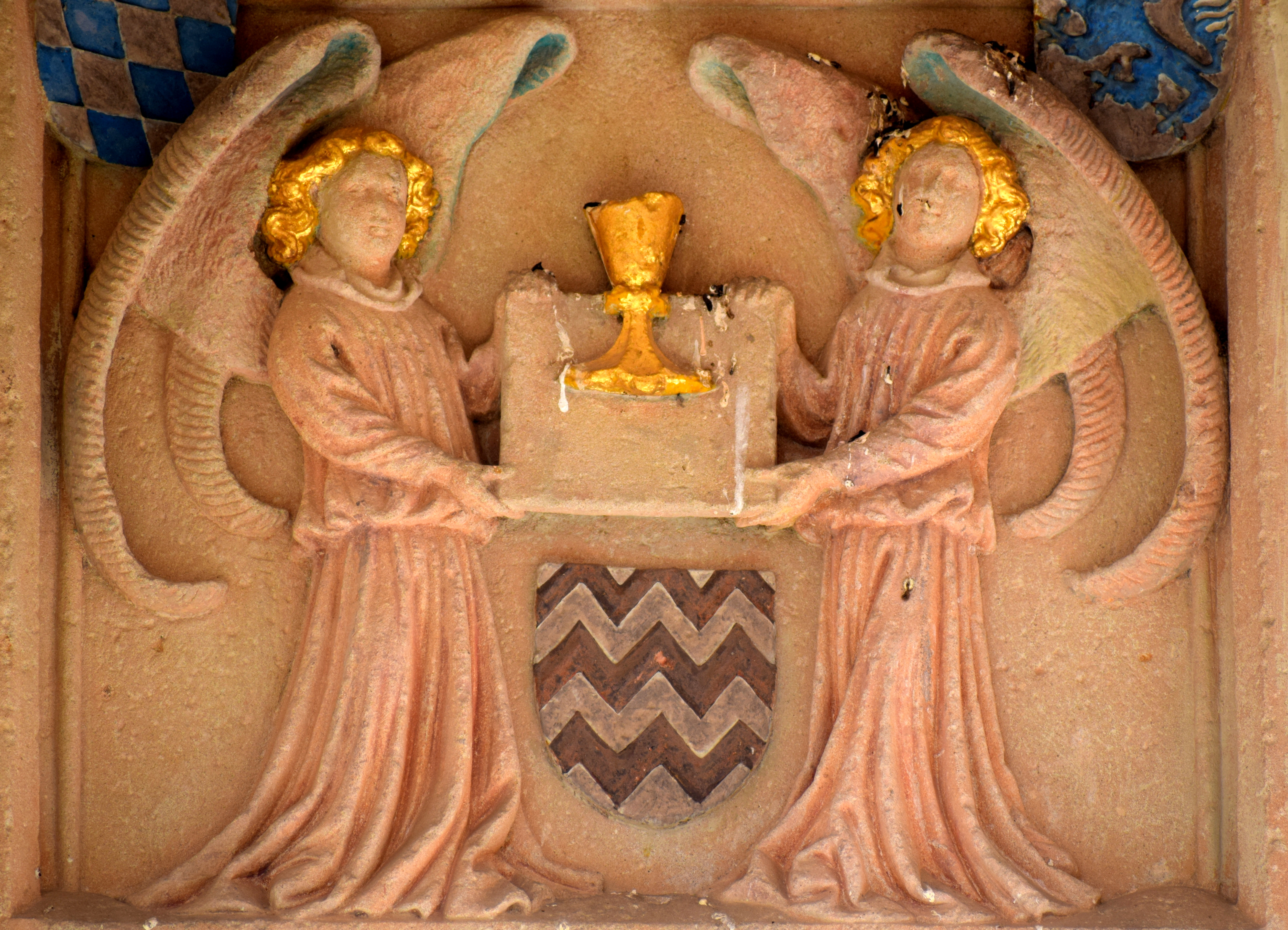 Armsheim, Kirche zum Heiligen Blut, Teil Gründungstafel in der Vorhalle